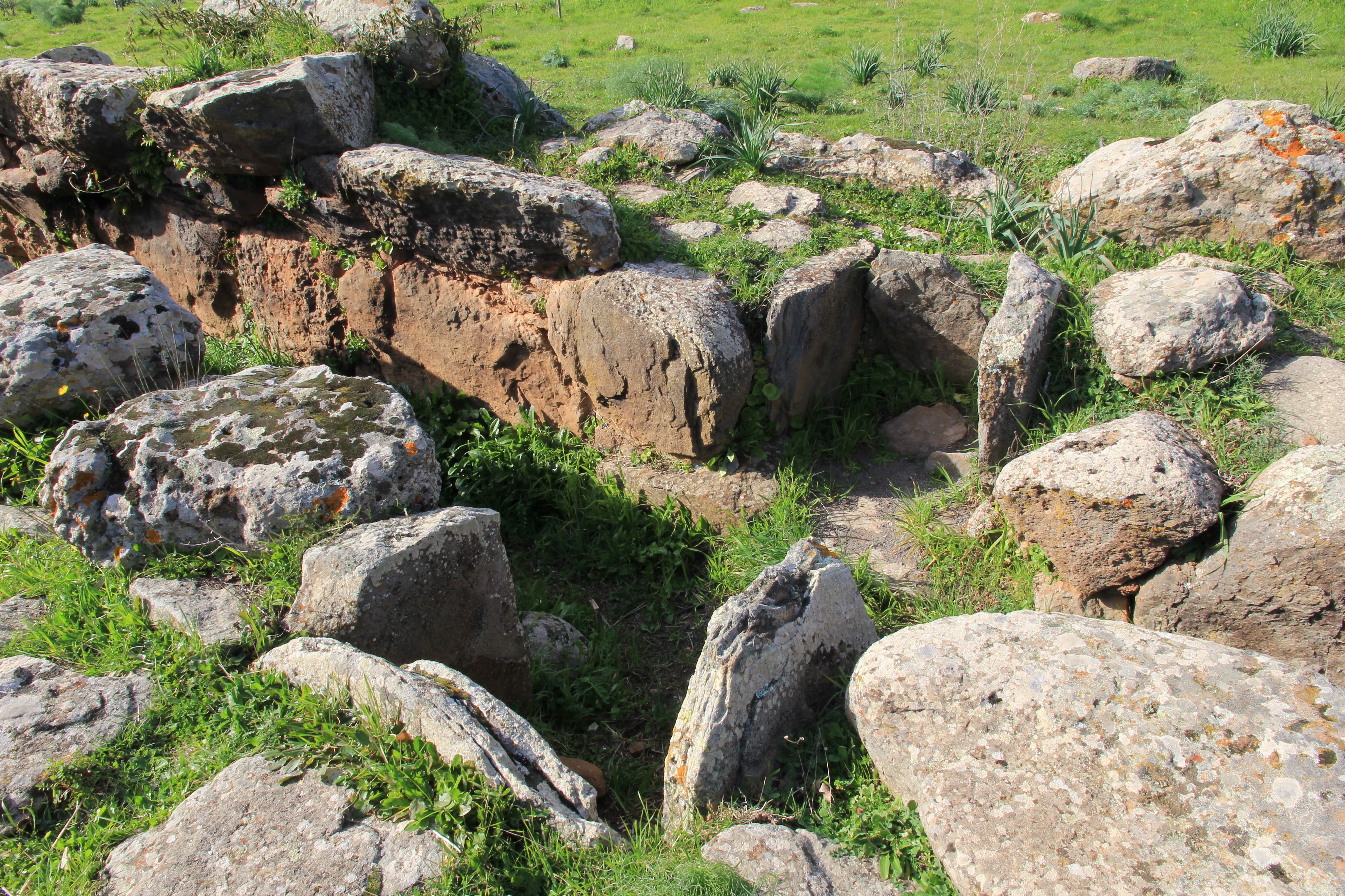 Birori - Tomba dei giganti di Palatu